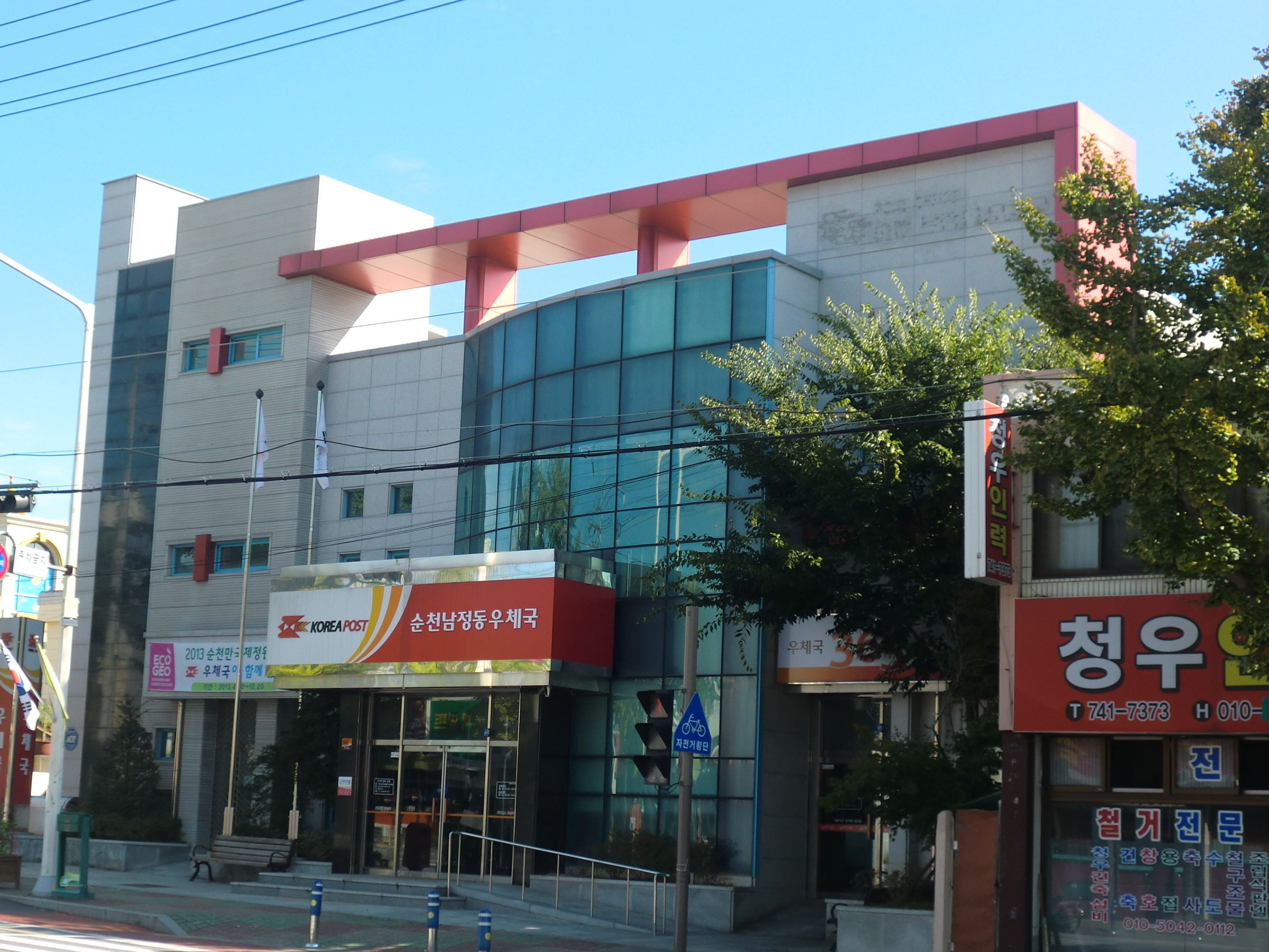 전라남도 순천시에 있는 순천남정동우체국